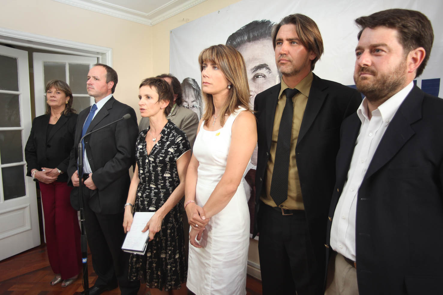 Presentación nuevos integrantes del Comando